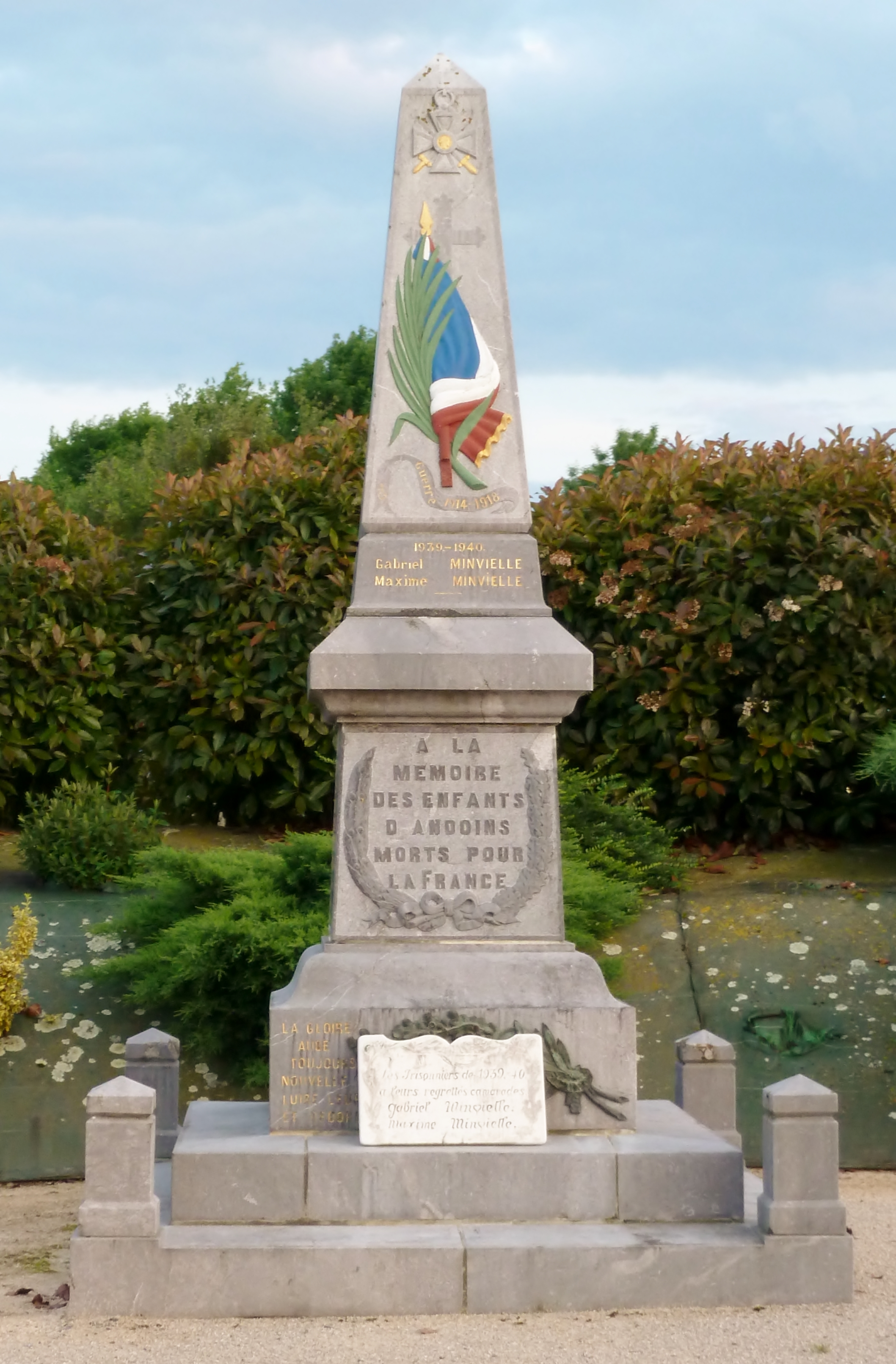 Andoins, France